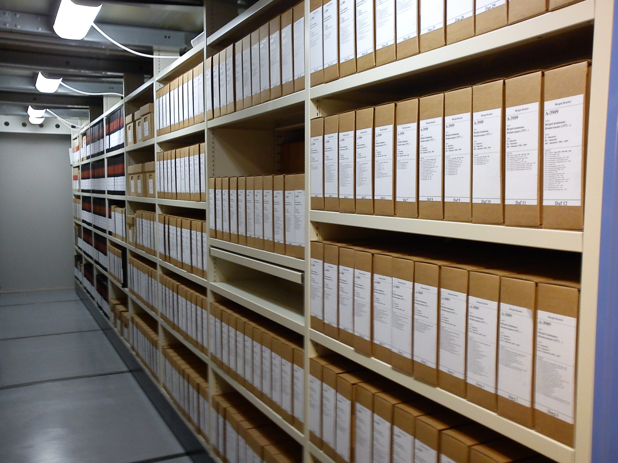 Arkivet etter Bergen Brannvesen. Foto Kristine Tvedt Brekke Bergen Byarkiv